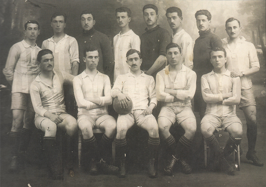 Η Ελληνική Στρατιωτική ομάδα ποδοσφαίρου που συμμετείχε στους Πανσυμμαχικούς Αγώνες στο Παρίσι το 1919. Από αριστερά επάνω: Λουκάς Πανουργιάς, Λ. Τραγανός, άγνωστος, Δ. Δεμερτζής, Βαγγέλης Κουρέντης, Γ. Δεμερτζής, Κ. Κστρίτσης, Μ. Ισαΐας Αριστερά κάτω: Γρ. Βλαχόπουλος, Γιάννης Σταυρόπουλος, Ιωσήφ Τερζάκης, Γιώργος Καλαφάτης, Γιώργος Χατζηανδρέου